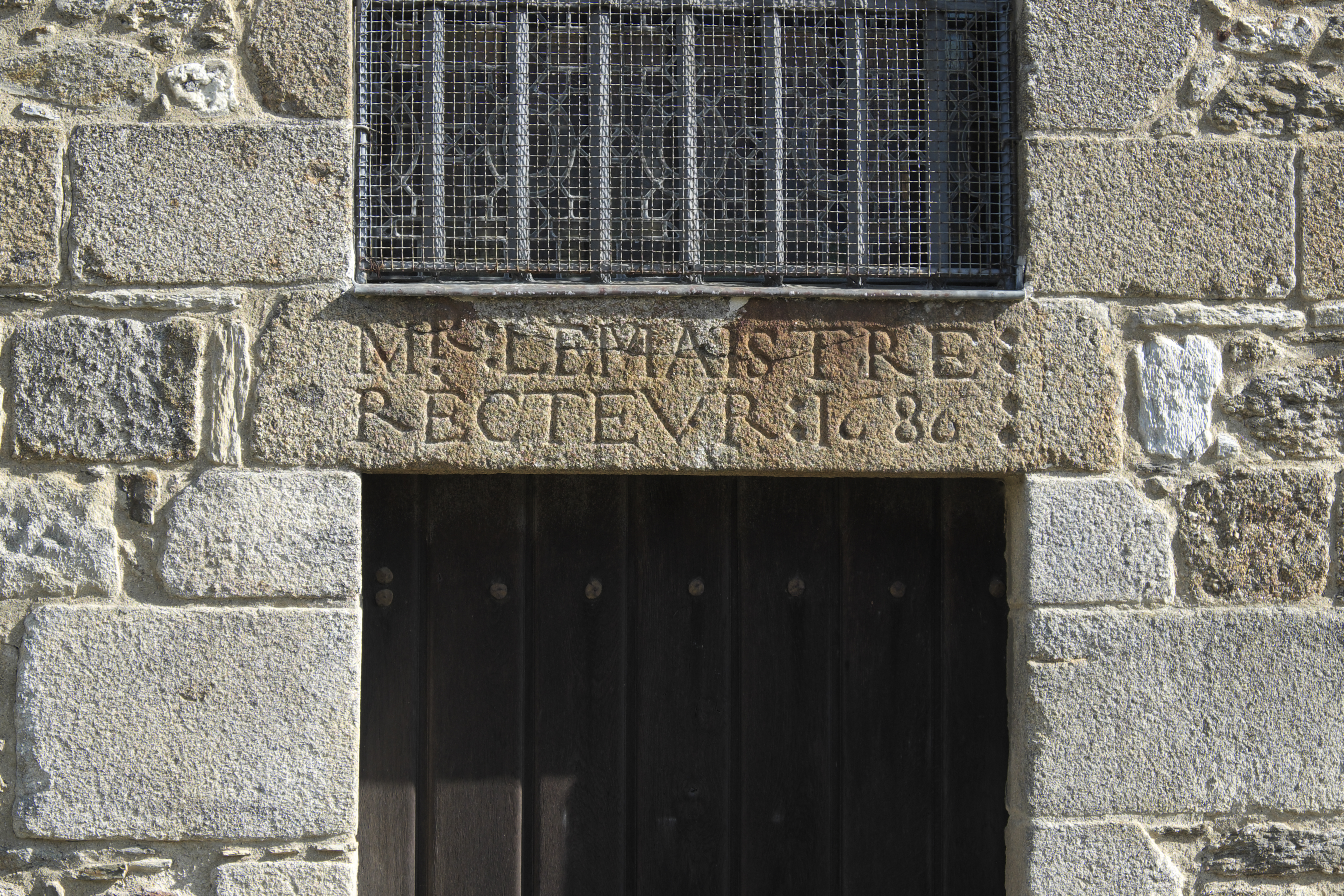 Alte Katholische Pfarrkirche Saint-Lunaire in Saint-Lunaire im Département Ille-et-Vilaine (Region Bretagne/Frankreich), Inschrift über dem Portal